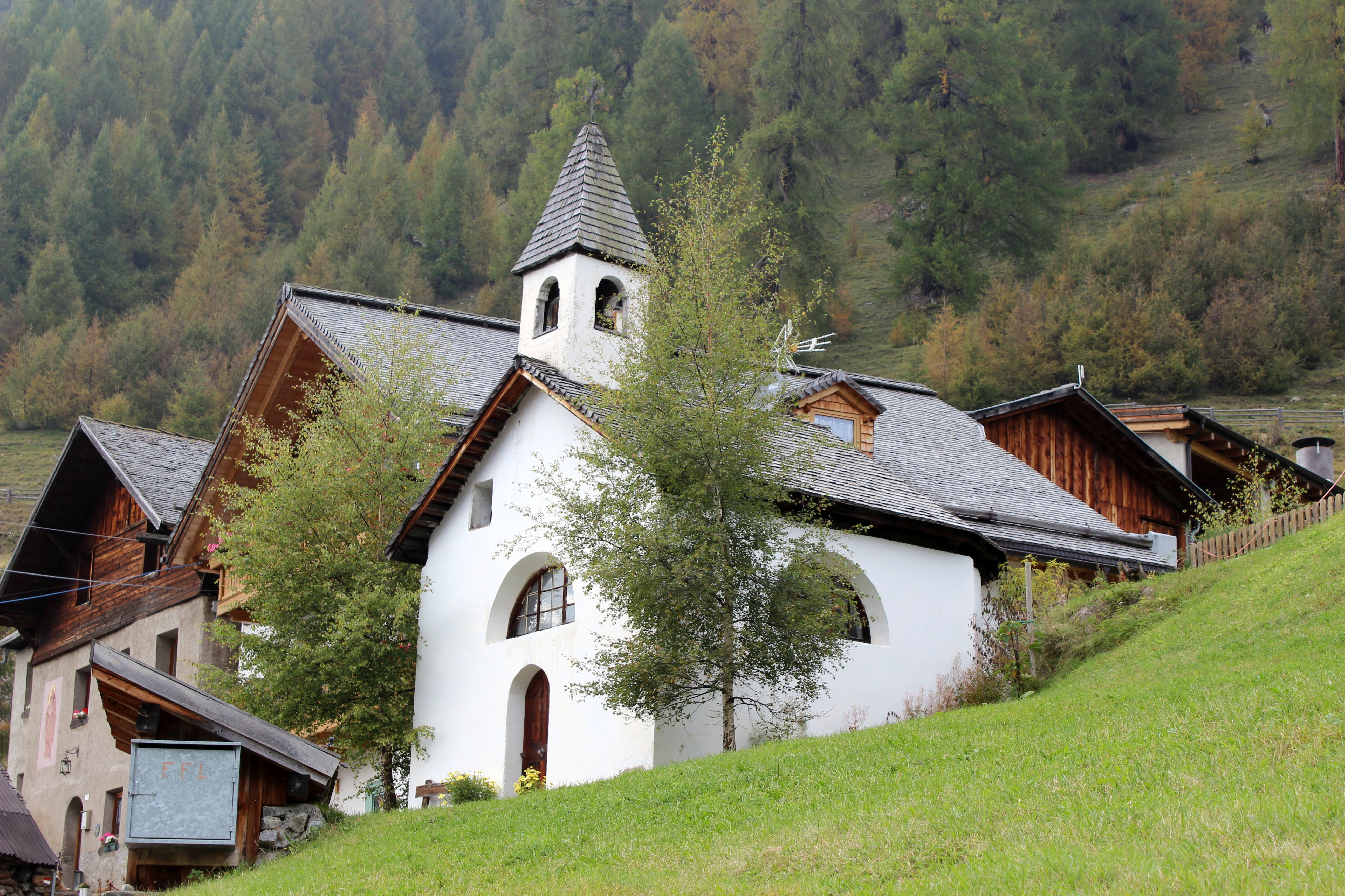 Kapelle in Pleif in Langtaufers